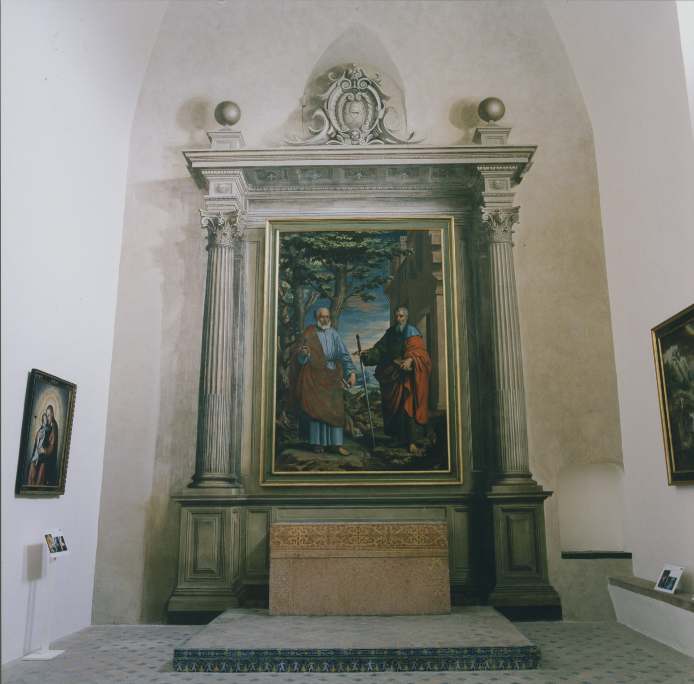 Juan Sánchez Cotán, Altar fingido de San Pedro y San Pablo, Cartuja de Granada, sala de profundis